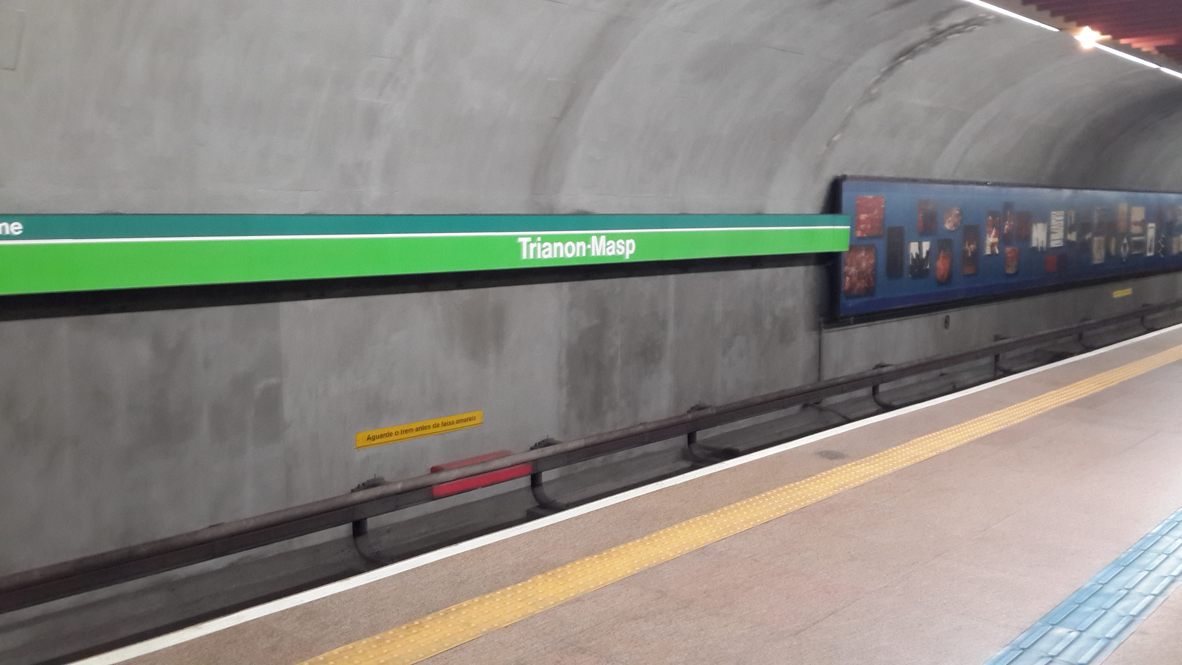 Plataforma da Estação Trianon-Masp da Linha 2 Verde do Metrô de São Paulo em 16 de Dezembro de 2016.